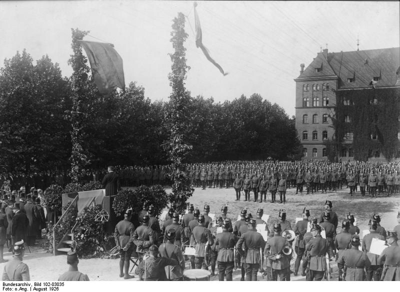 Verfassungsfeier bei der Schutzpolizei! Blick auf die Verfassungsfeier der Schutzpolizei im Kasernenhof der Polizeigruppe Süd, während der Ansprache der des Vizepolizeipräsidenten Friedensburg.